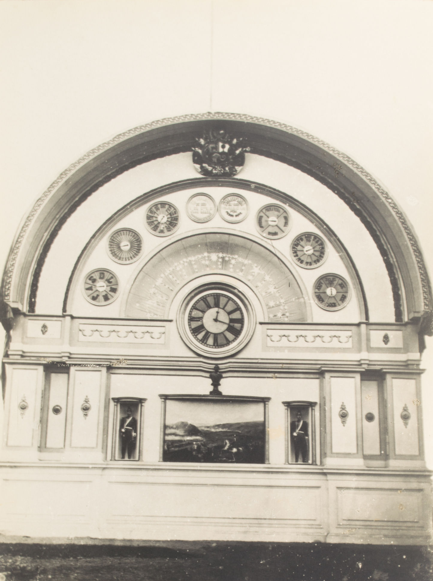 Reloj construido por Pedro Ruiz Gallo y donado a la ciudad de Lima en 1870